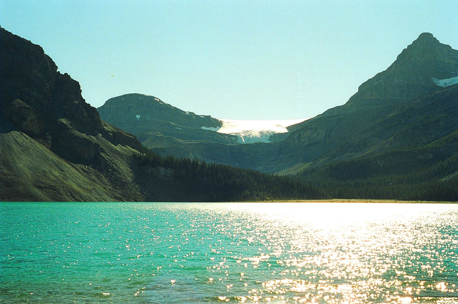 אגם בואו וקרחון בואו